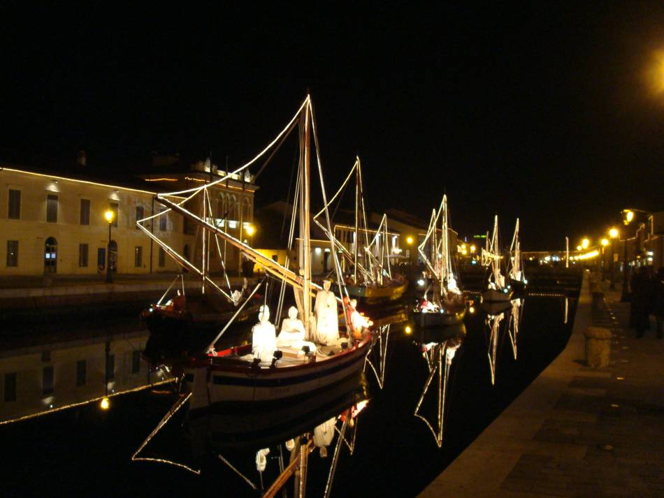 Barques illuminée du port-canal de Cesenatico pour le Nouvel-an